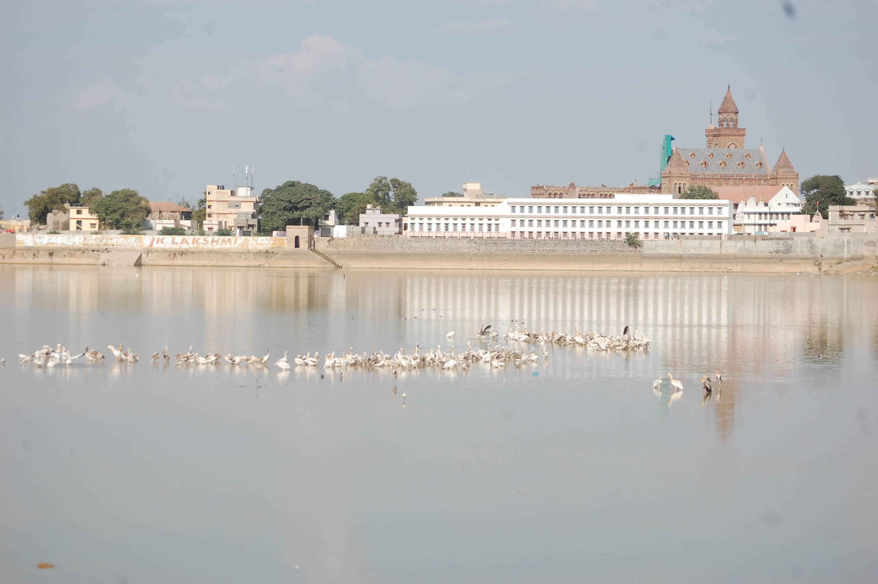 ગુજરાતી: હમીરસર તળાવ